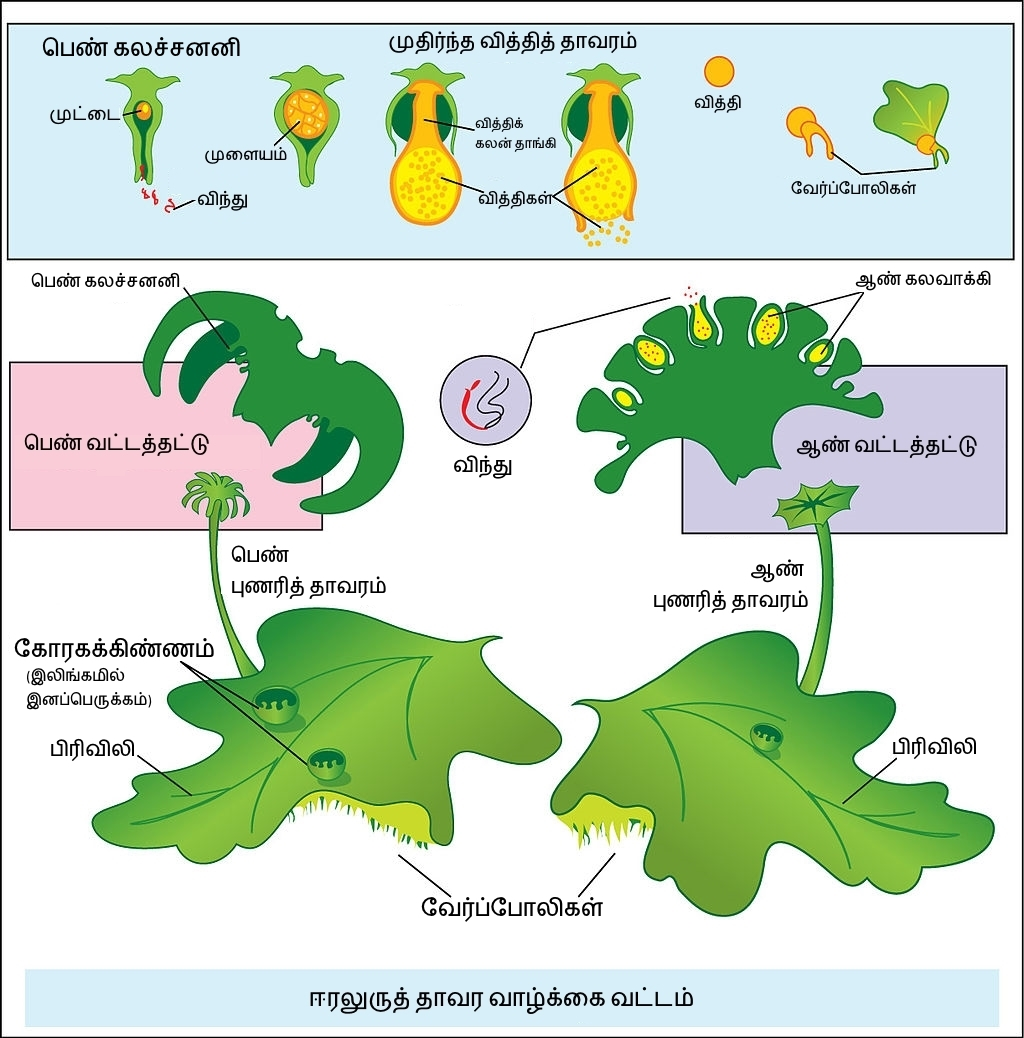 ஈரலுருத் தாவரத்தின் வாழ்க்கை வட்டம்